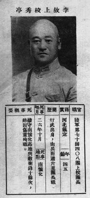 中文（台灣）: 抗戰軍人忠烈錄第一輯中的烈士遺像